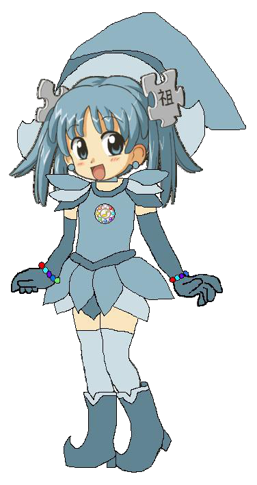 Ojamajo Wikipe-tan